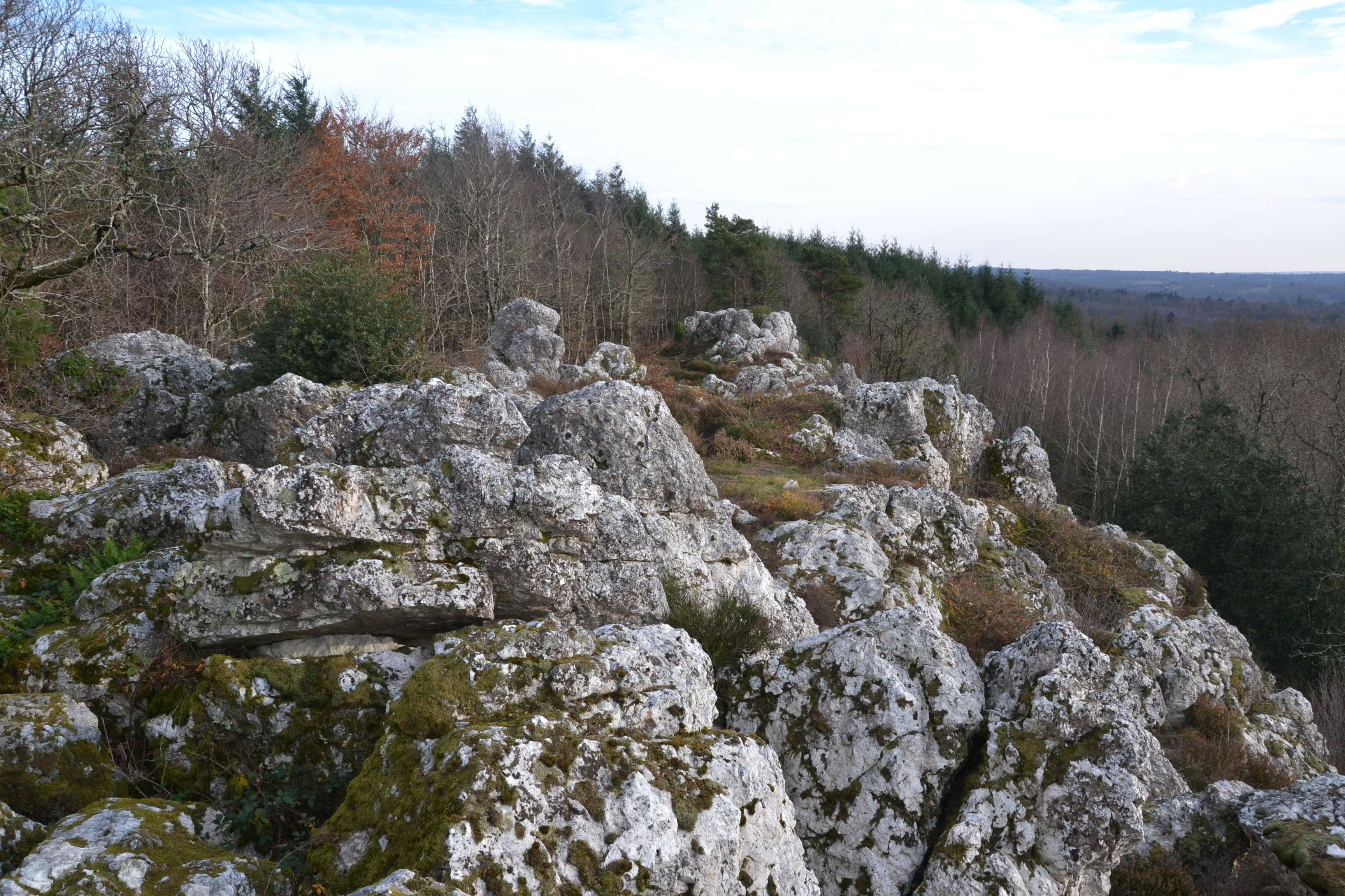 Affleurements de quartz de la butte de Frochet (Bussière-Boffy, Haute-Vienne, France).